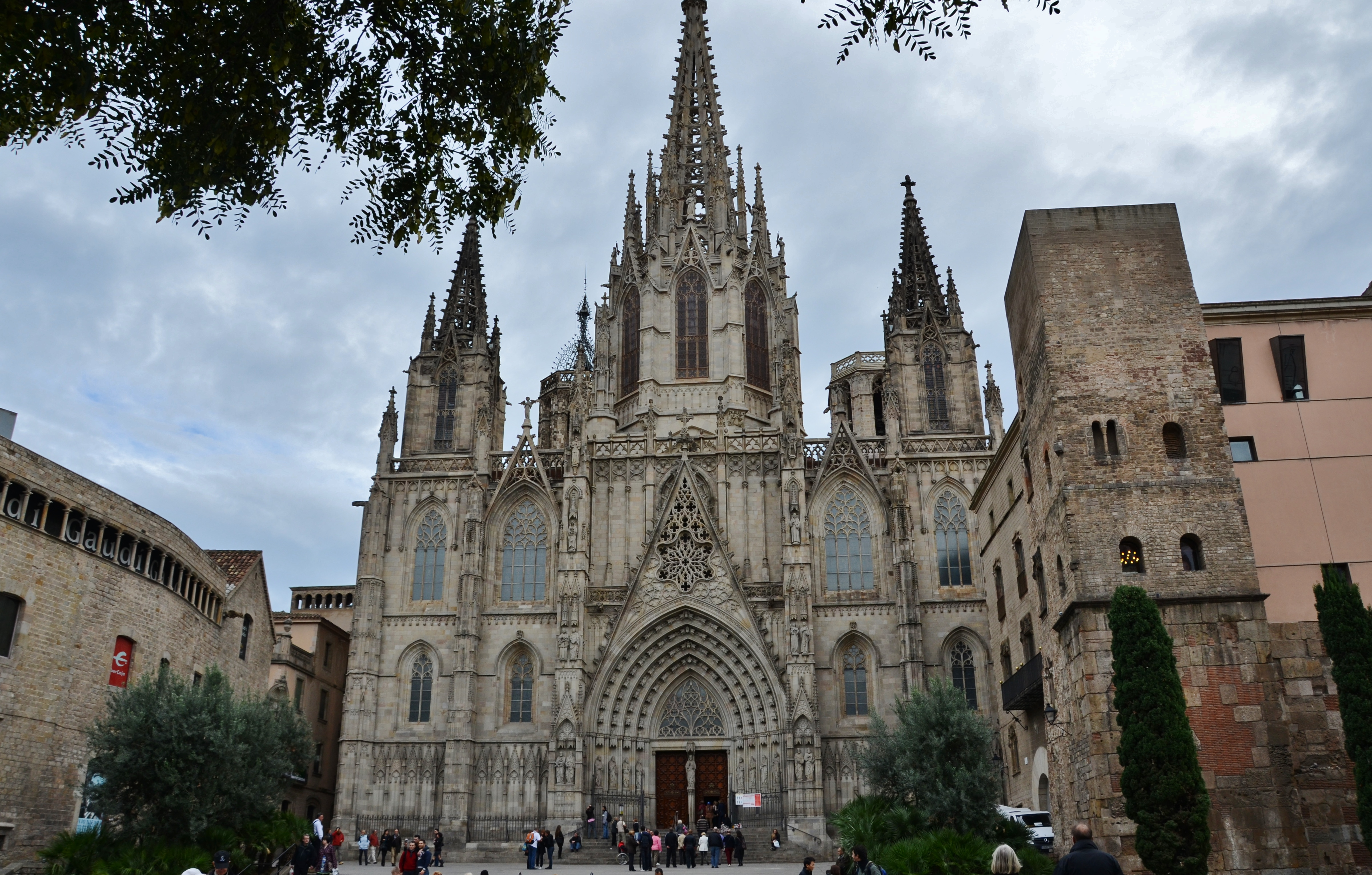 Catedral de la Santa Creu, Barri Gòtic, Barcelona